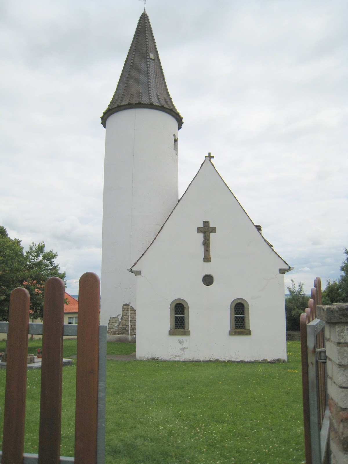 Kirchberg church, Berg, France